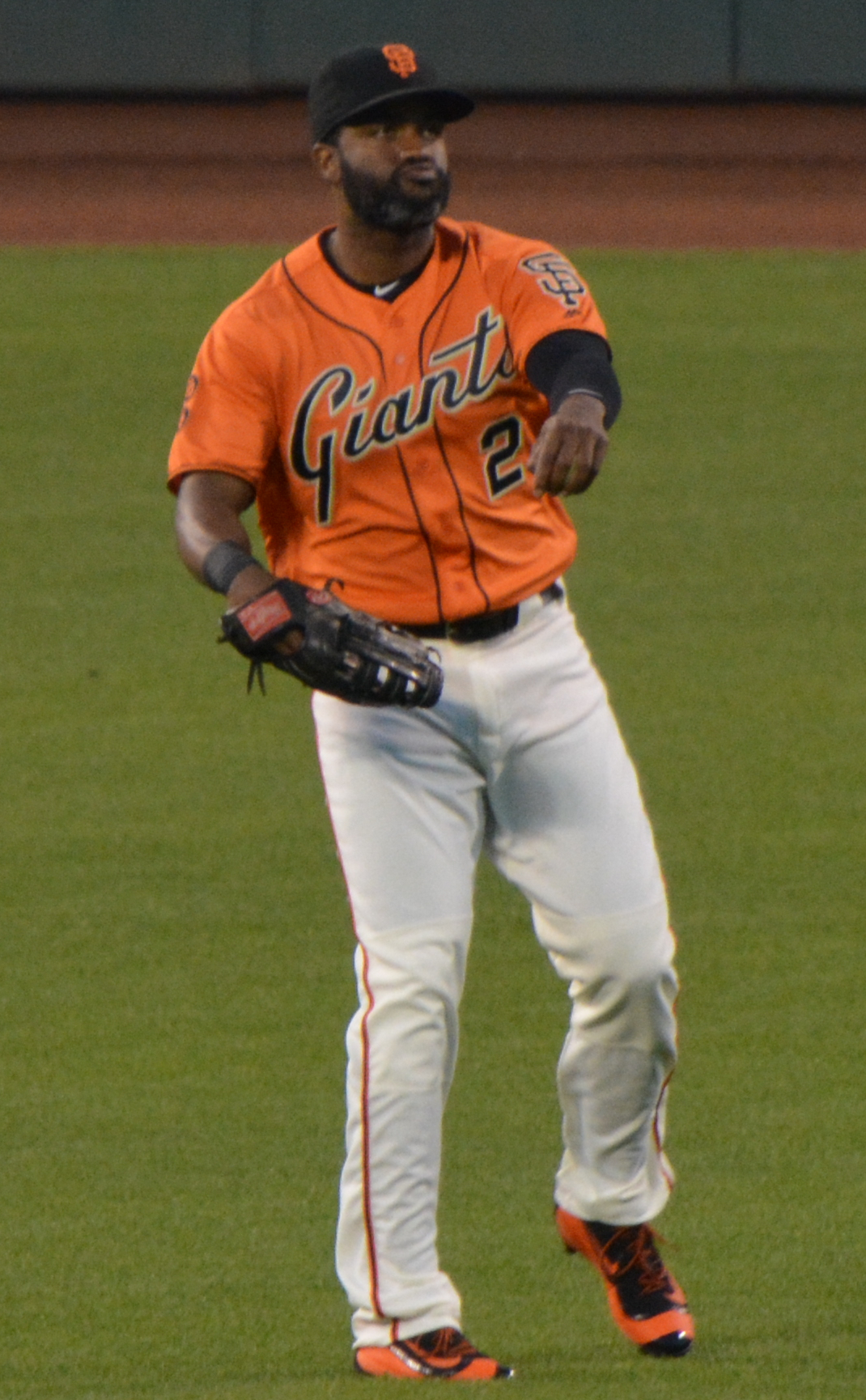 Denard Span